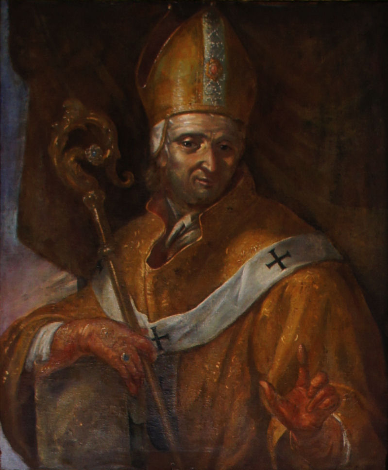 Porträtgemälde von Wolfram, Bischof von Freising, im Fürstengang zwischen Fürstbischöflicher Residenz und Freisinger Dom.